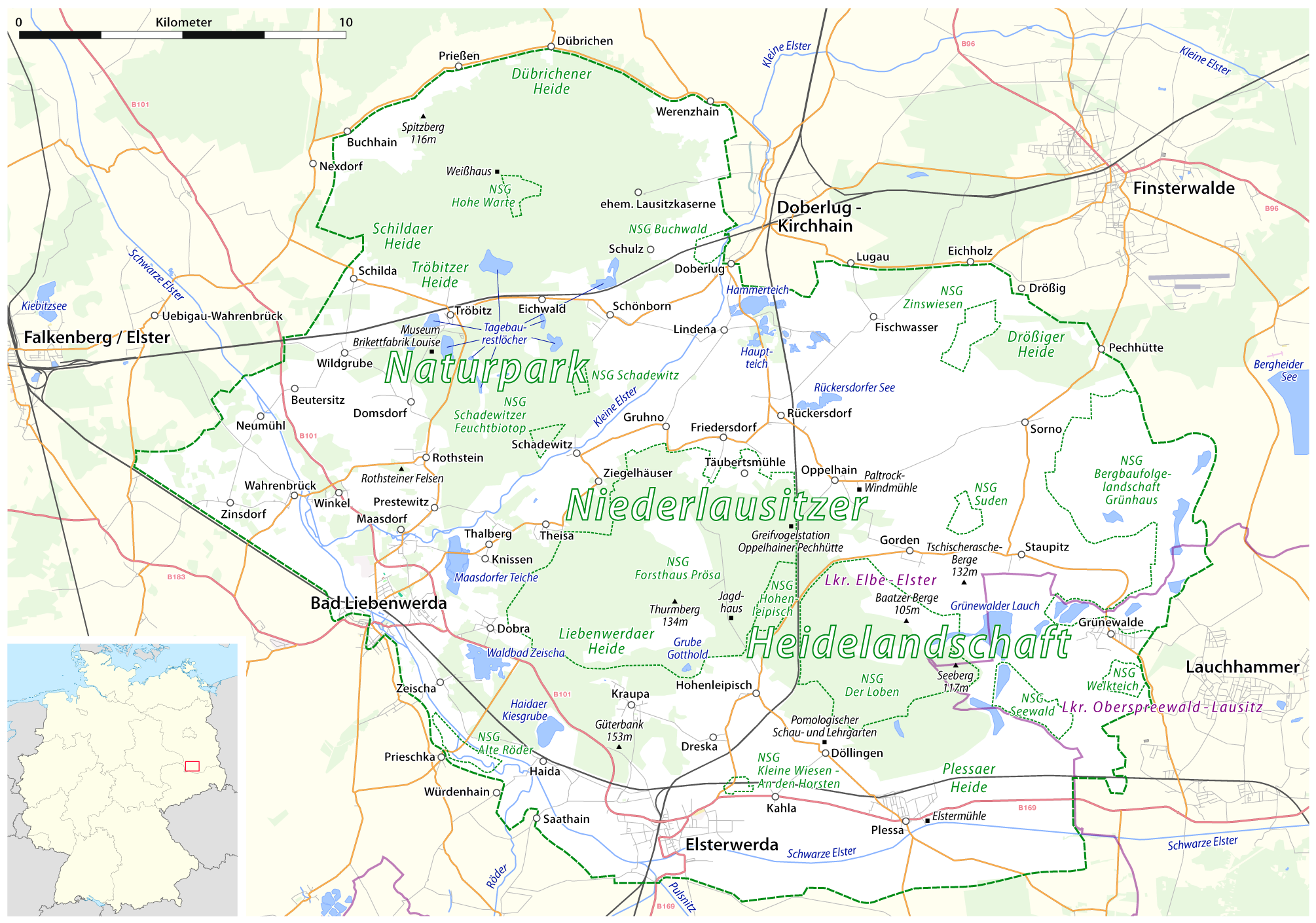 Karte vom Naturpark Niederlausitzer Heidelandschaft